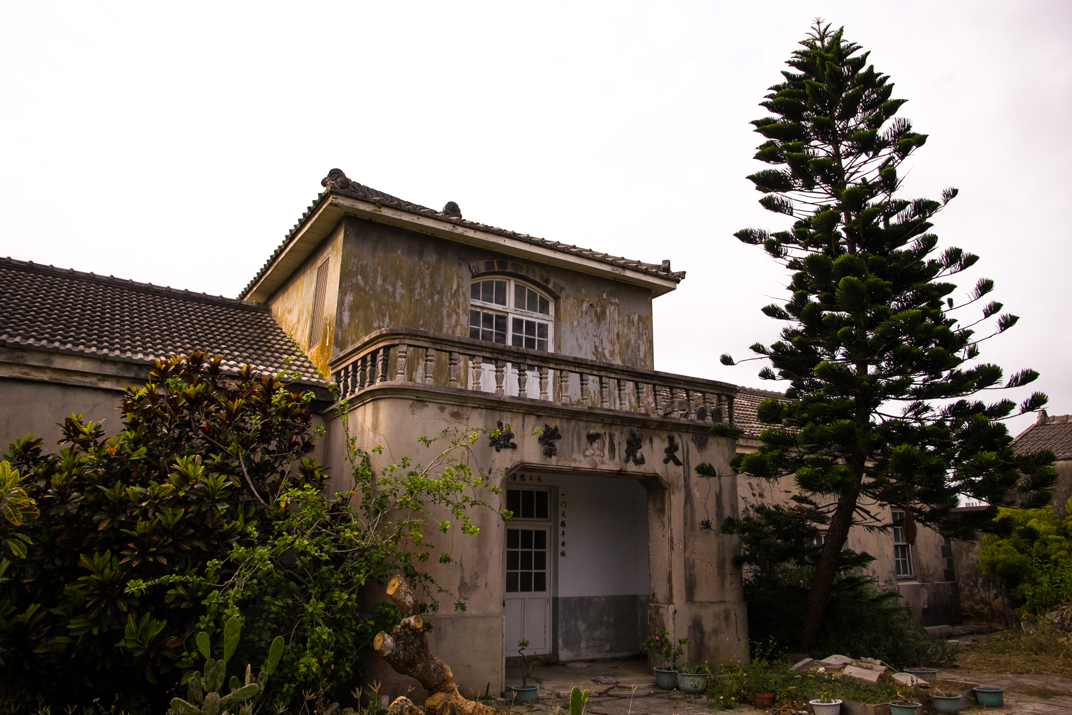 湖西朝日貝釦工廠